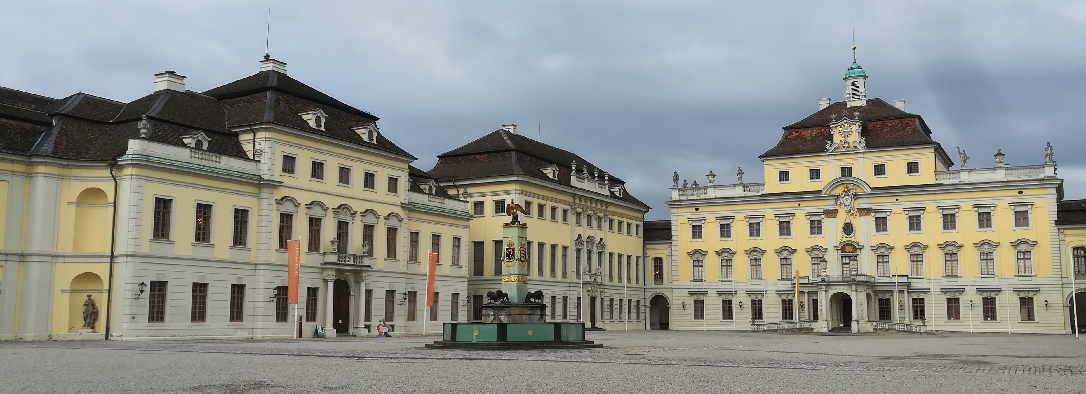 Ludwigsburg Palace in December 2018